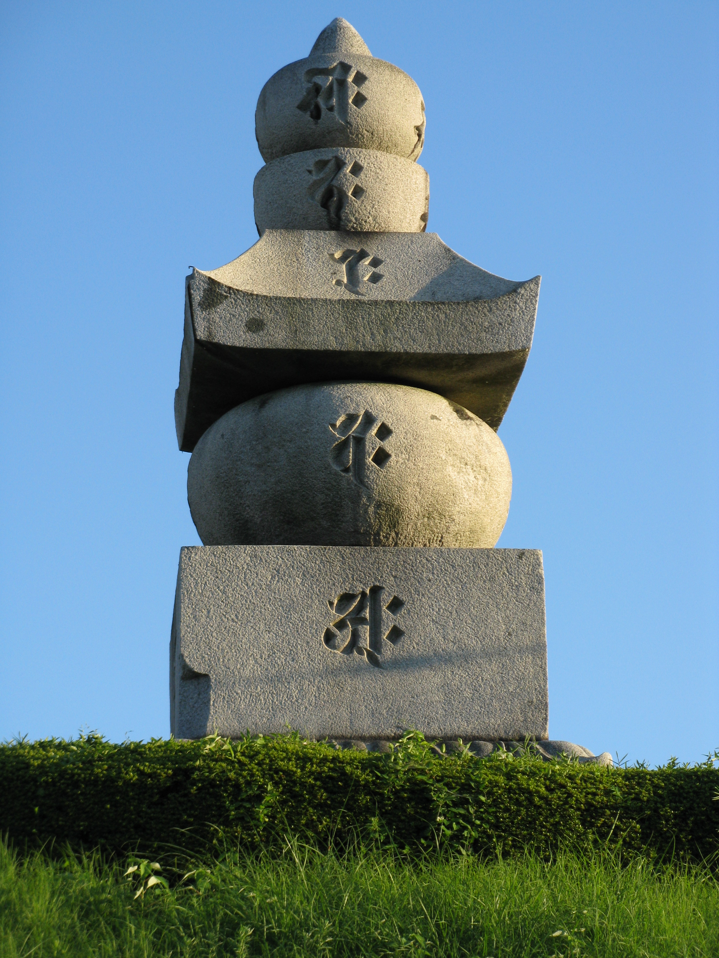 耳塚